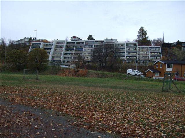 Bak terassehusene i Jonsvannsveien ligger det berget som danner stedsnavnet Berg.